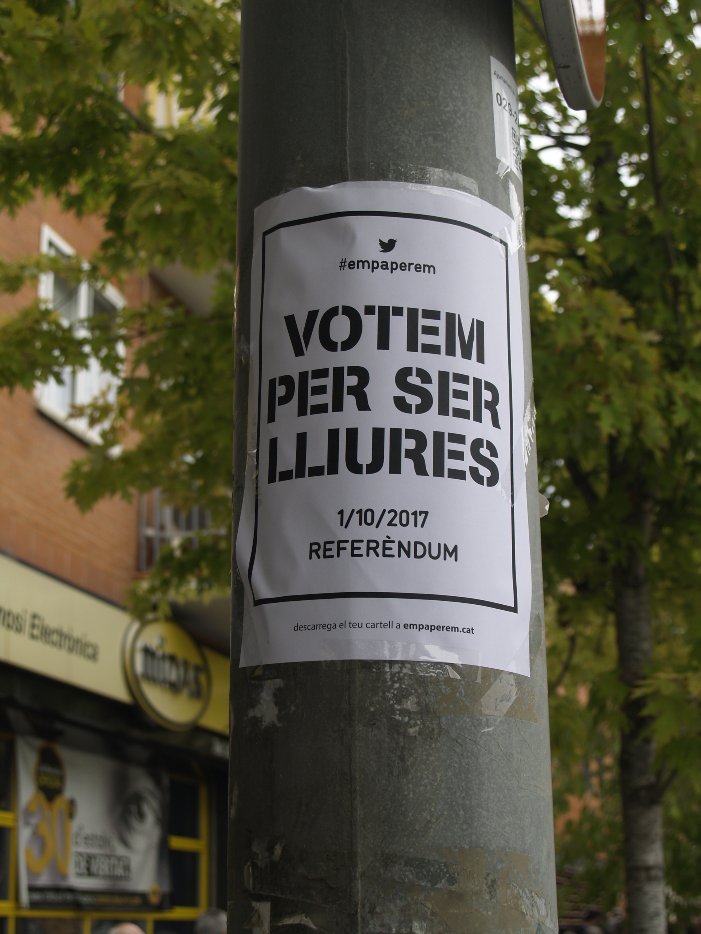 Cartel llamando a votar delante del CAP St. Miquel, Granollers